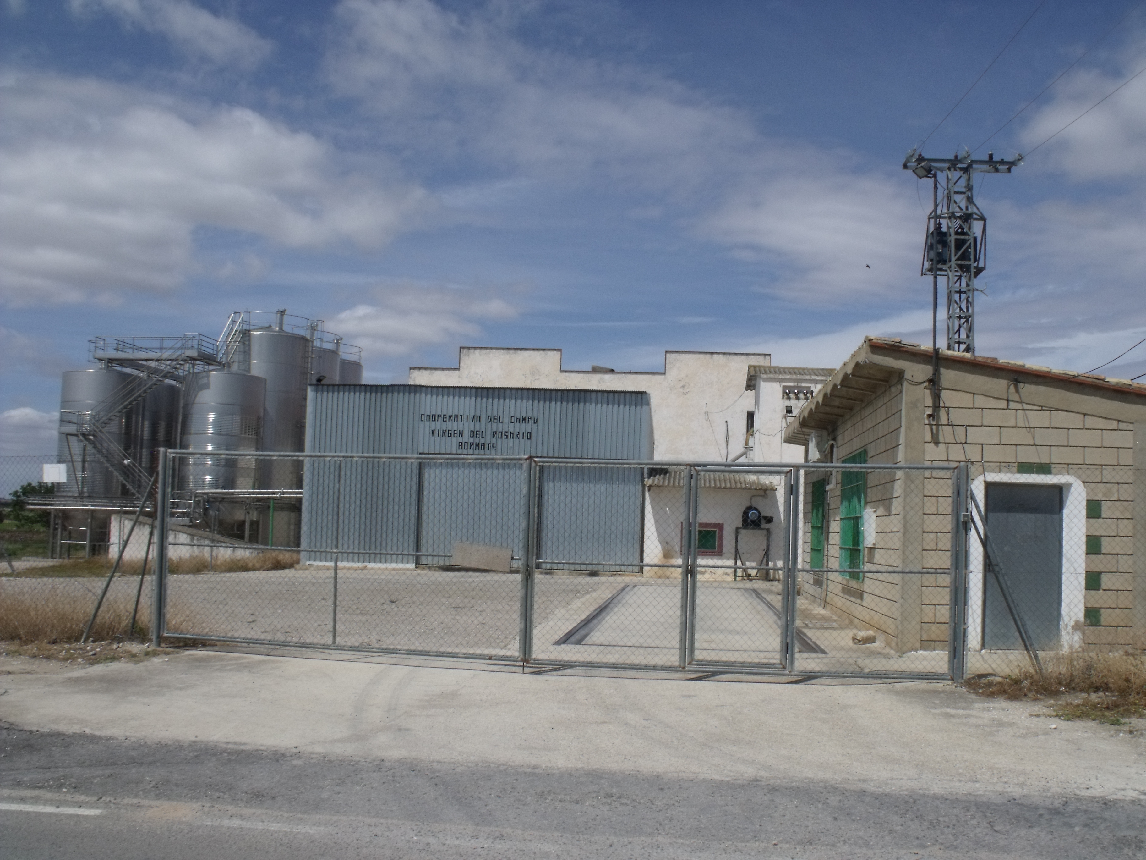 Imagen de Bormate durante el Wiki takes La Manchuela 2017